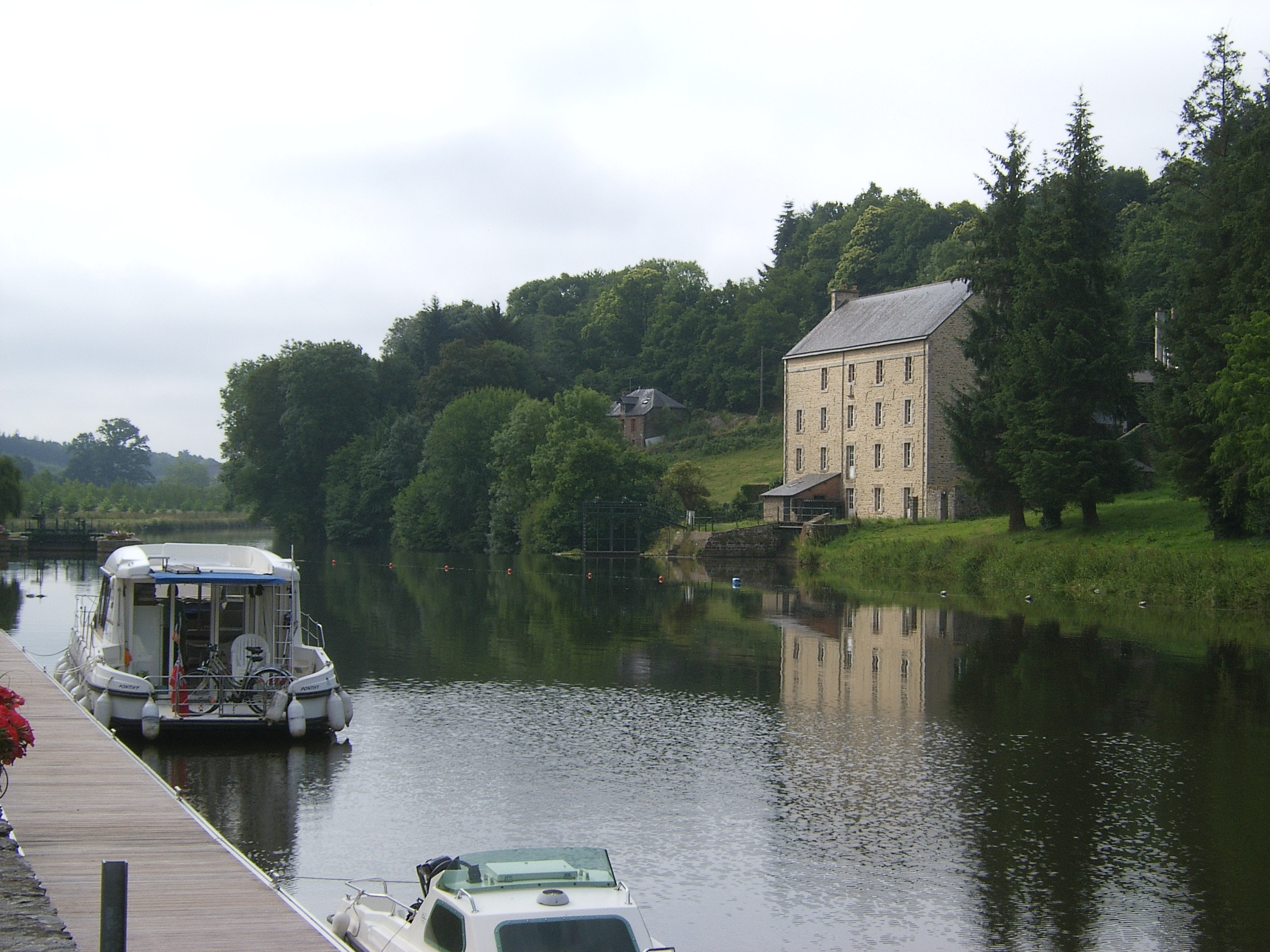 L'Oust à Josselin.